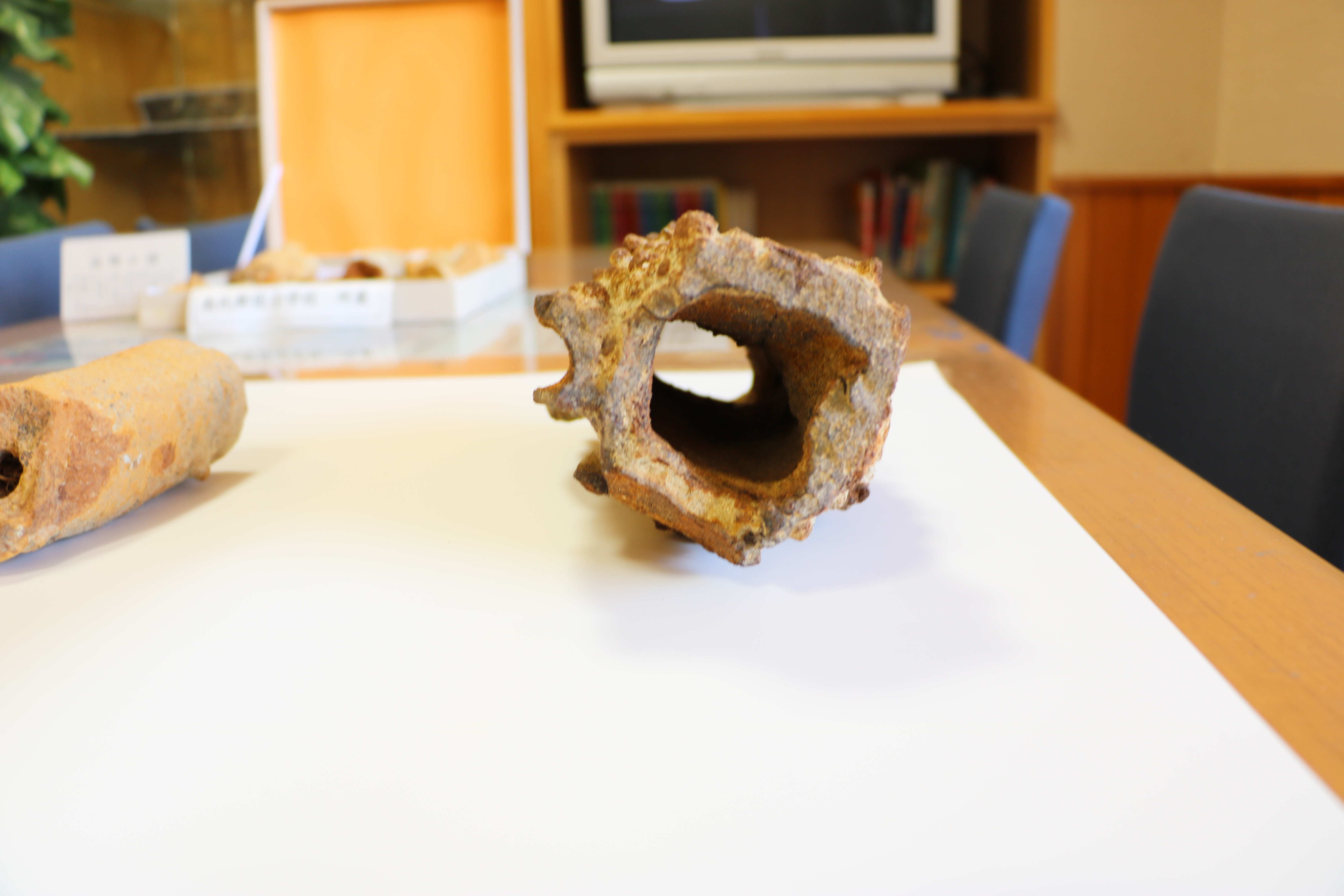 別所高師小僧（国指定天然記念物、滋賀県蒲生郡日野町）南比都佐公民館所蔵。公民館主事立ち合いのもと撮影。